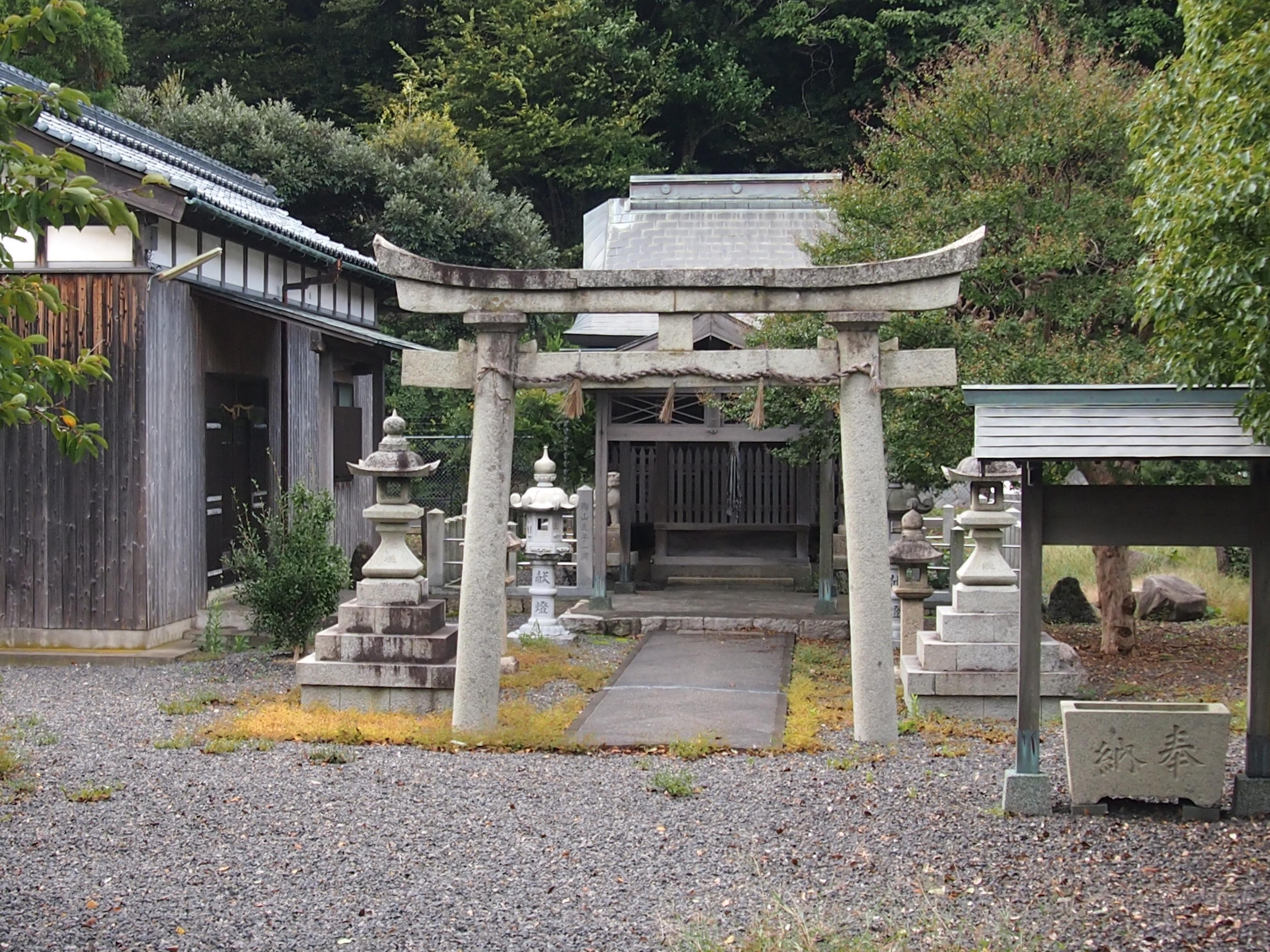 敦賀市の鞠山神社、鞠山藩陣屋跡